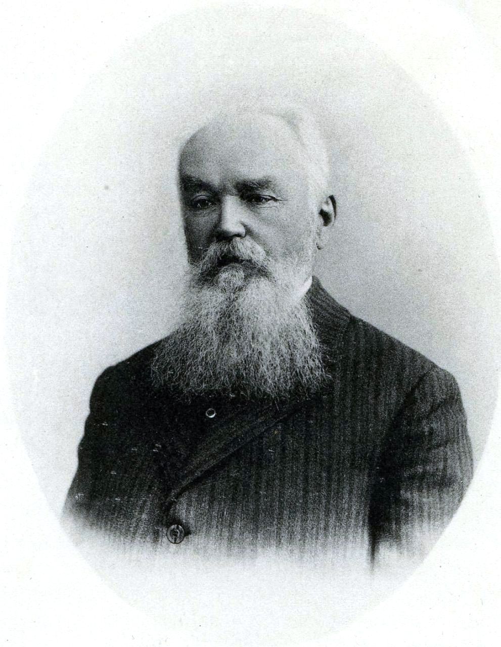 Износков, Александр Александрович